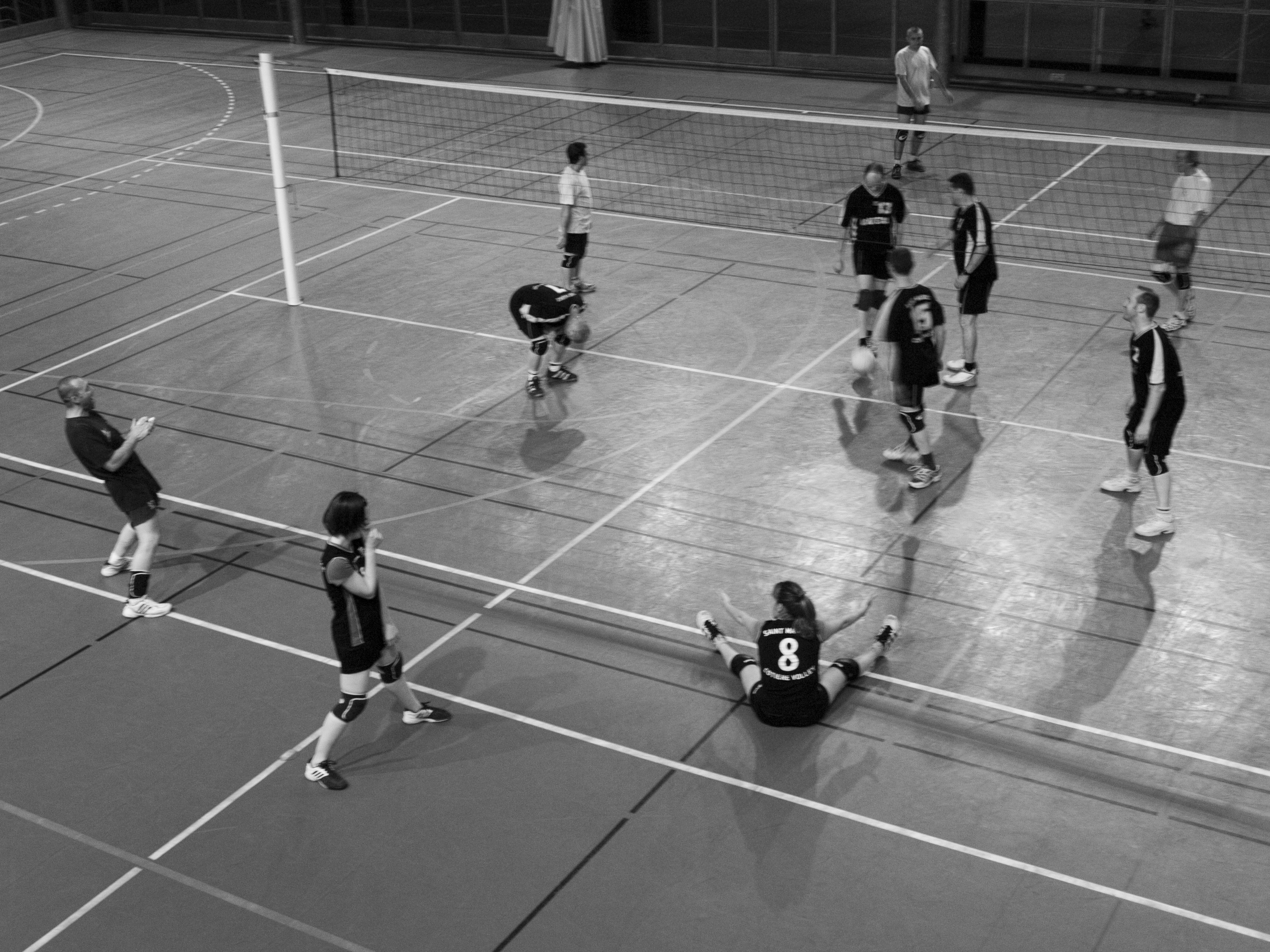 Les positions au Volley